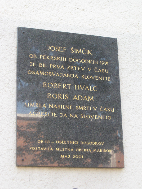 Plošča Maribor Josef Šimčik